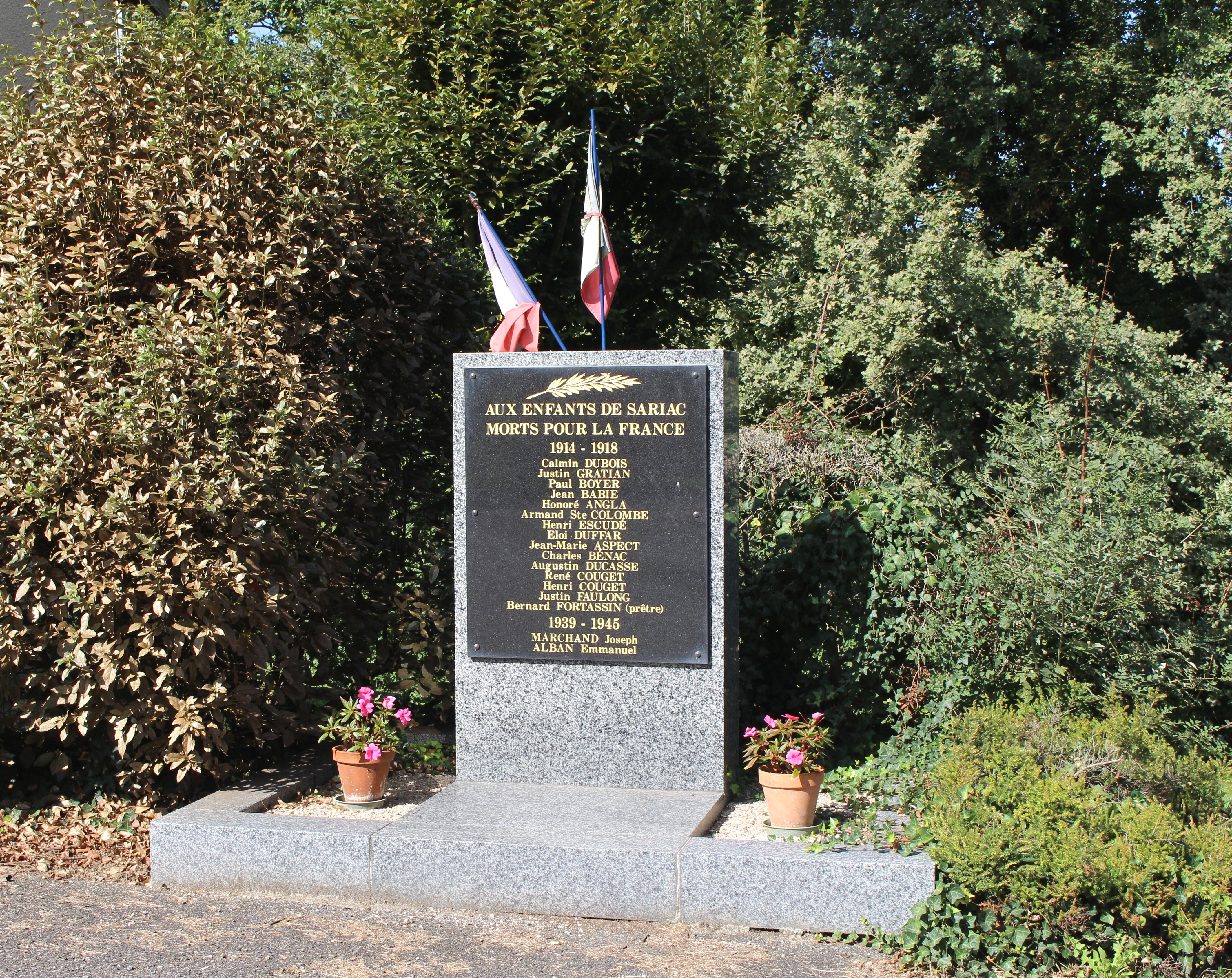 Monument aux morts de Sariac-Magnoac (Hautes-Pyrénées)